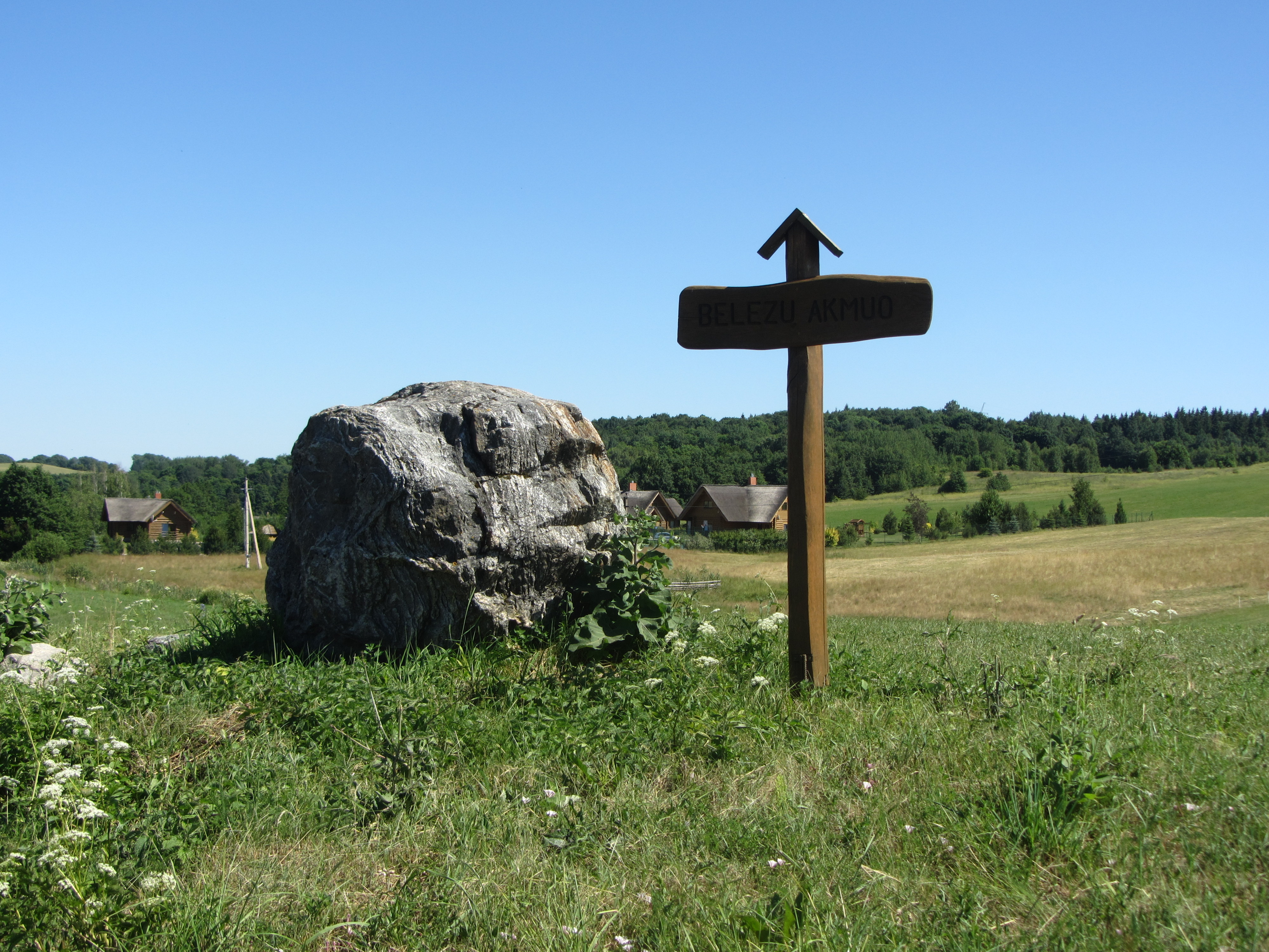 Pastrėvio sen., Lithuania